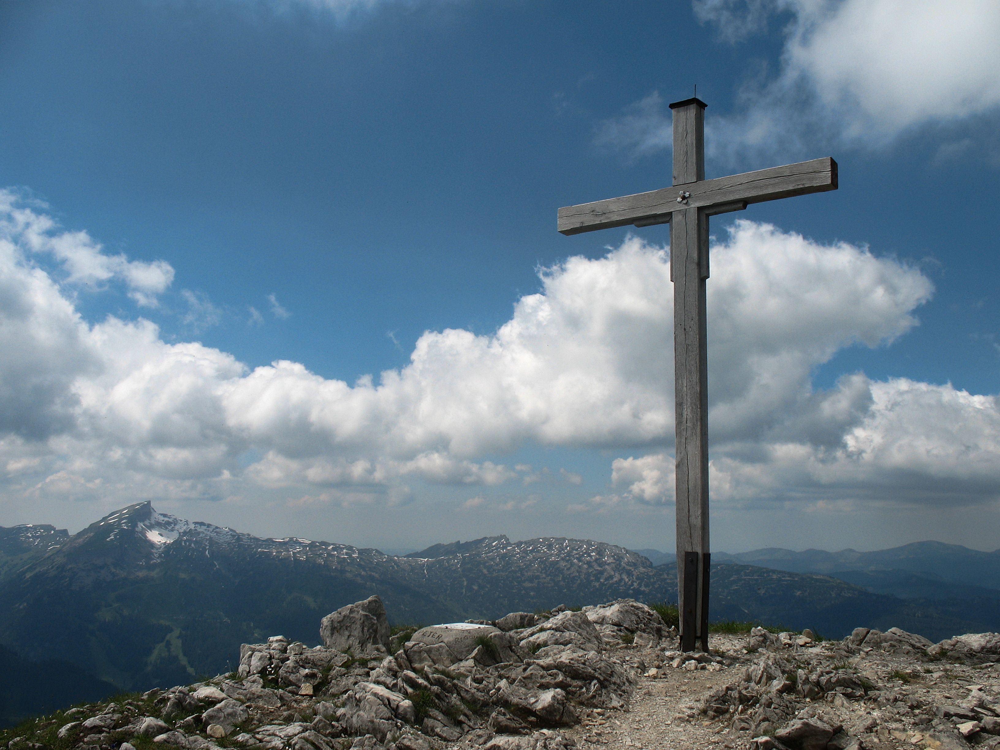 Gipfelkreuz auf der Walser Hammerspitze (vormals Schüsser, 2170 m), dahinter Hoher Ifen (2229 m) und Oberes Gottesackerwände (2033 m).